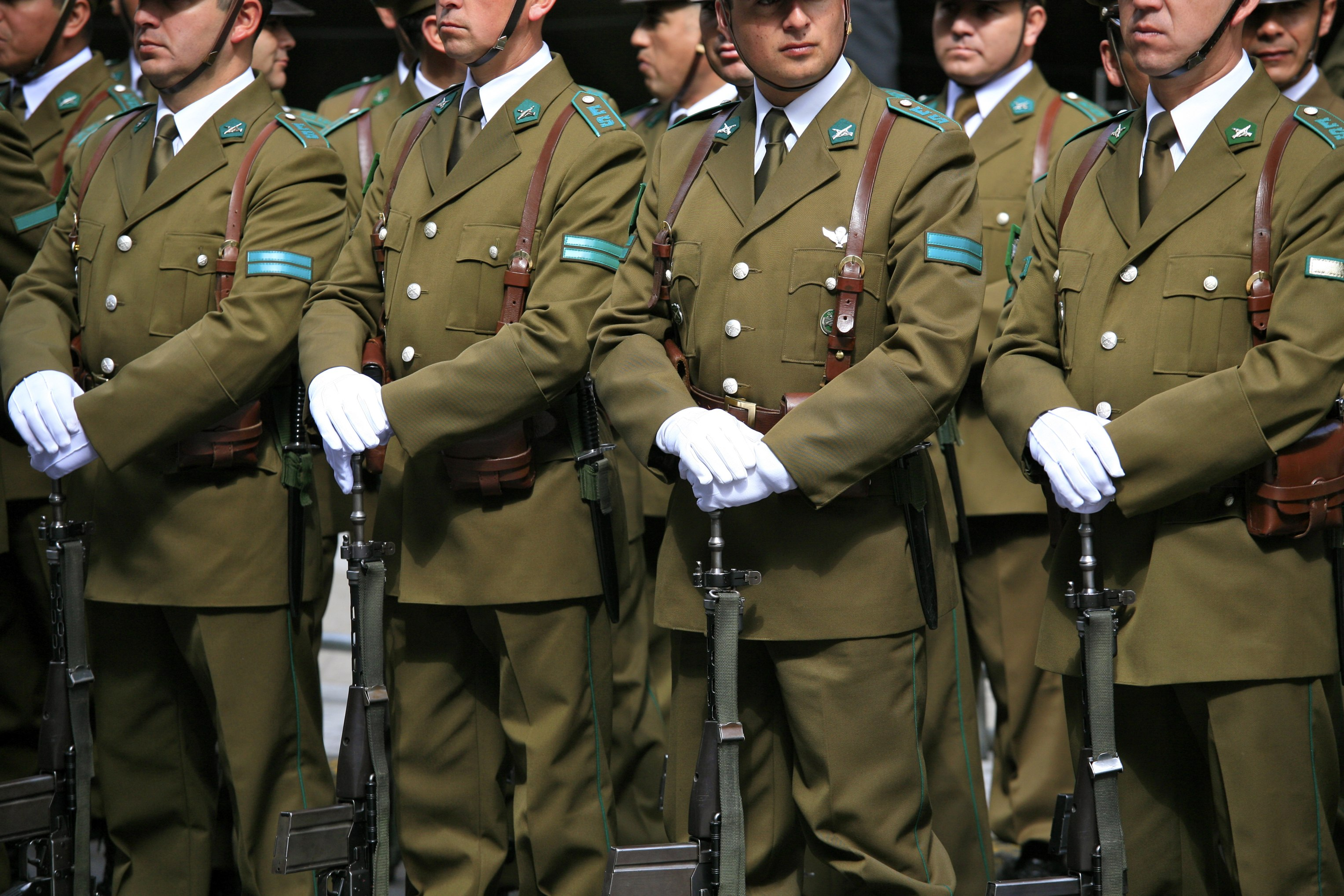 Sub-oficiales de Carabineros de Chile.